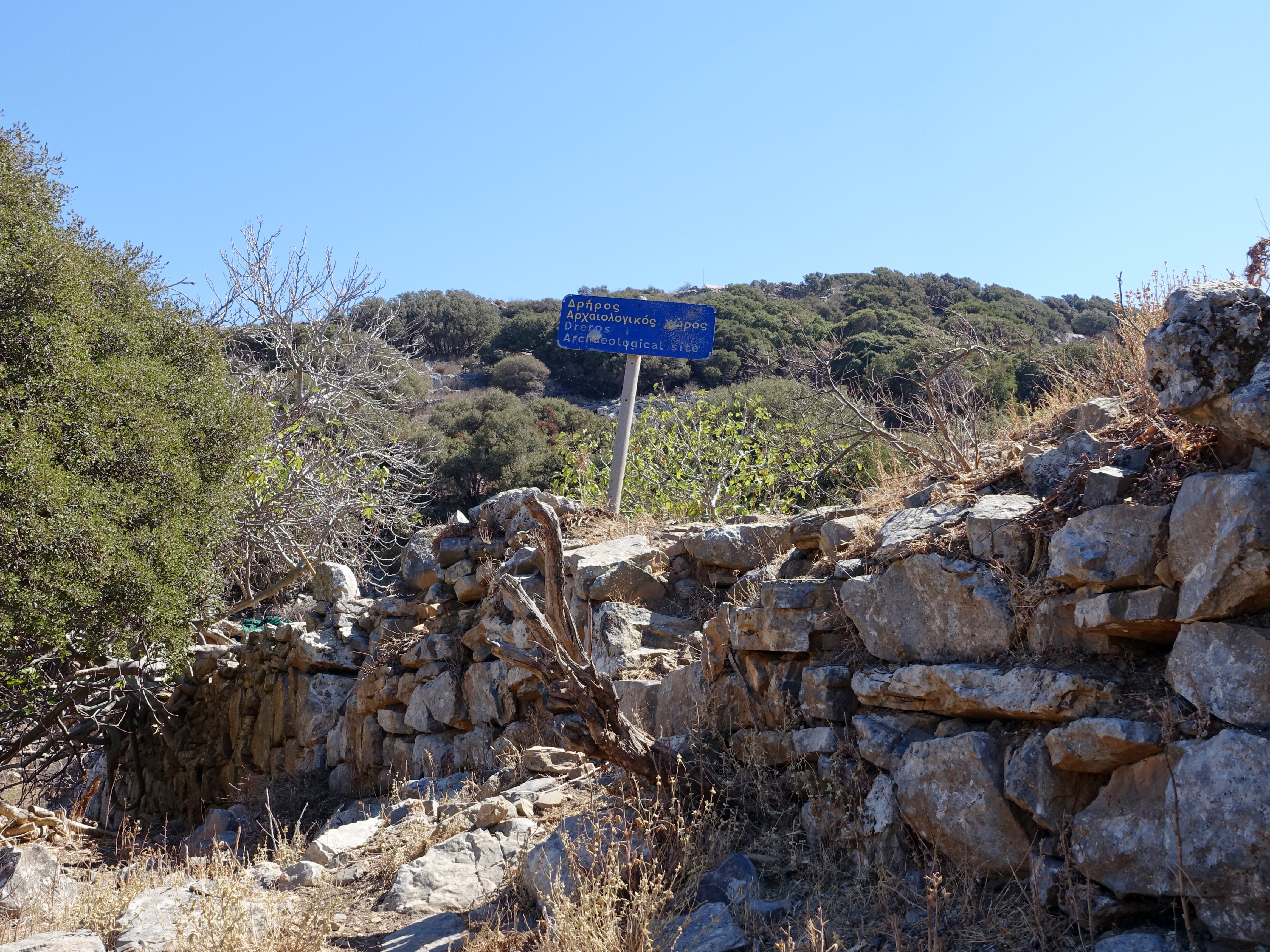 Hinweisschild an der Ausgrabungsstätte von Dreros (Δρῆρος), Gemeinde Agios Nikolaos, Kreta, Griechenland